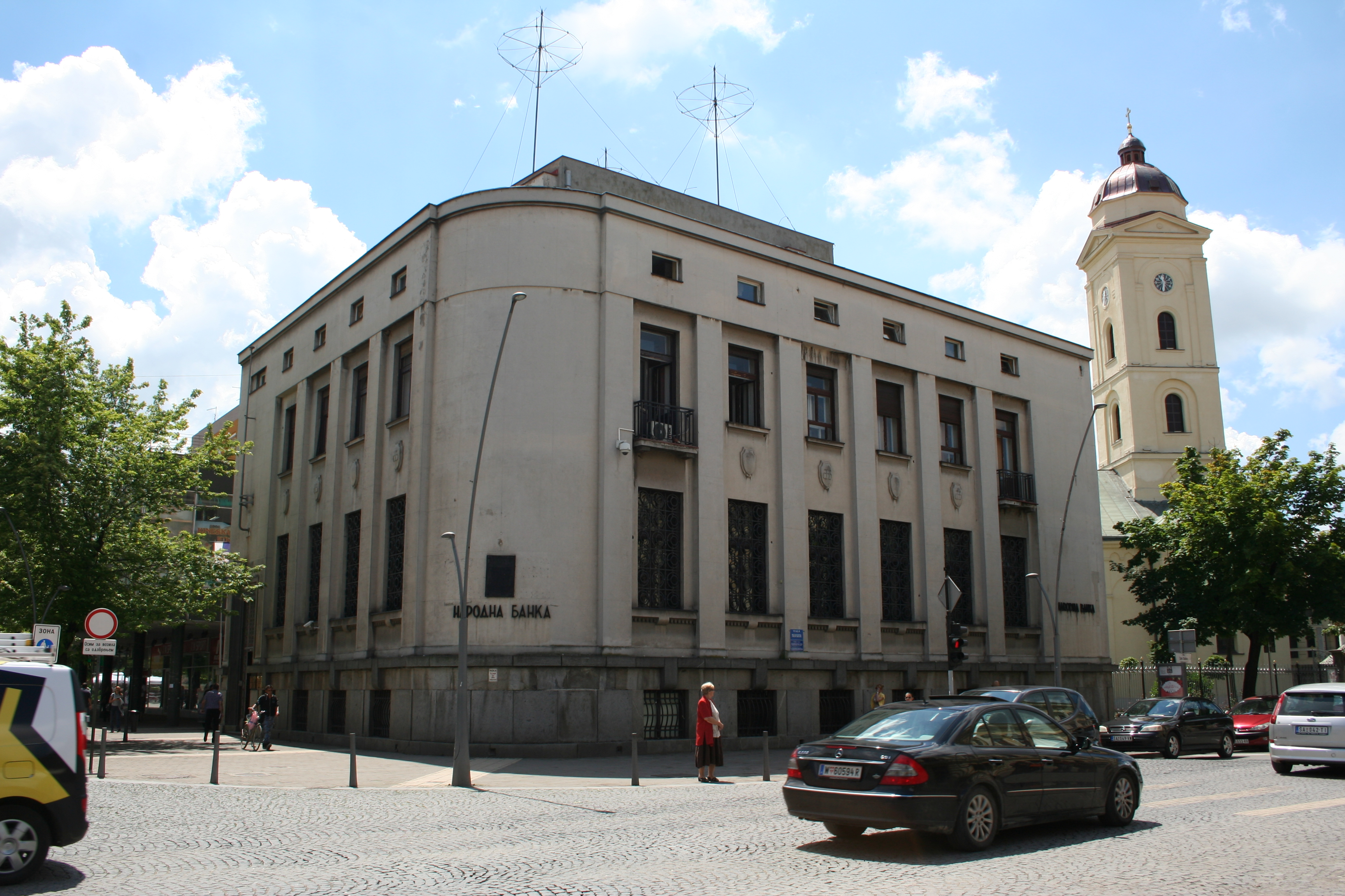 Zgrada bivše Narodne banke (SDK)